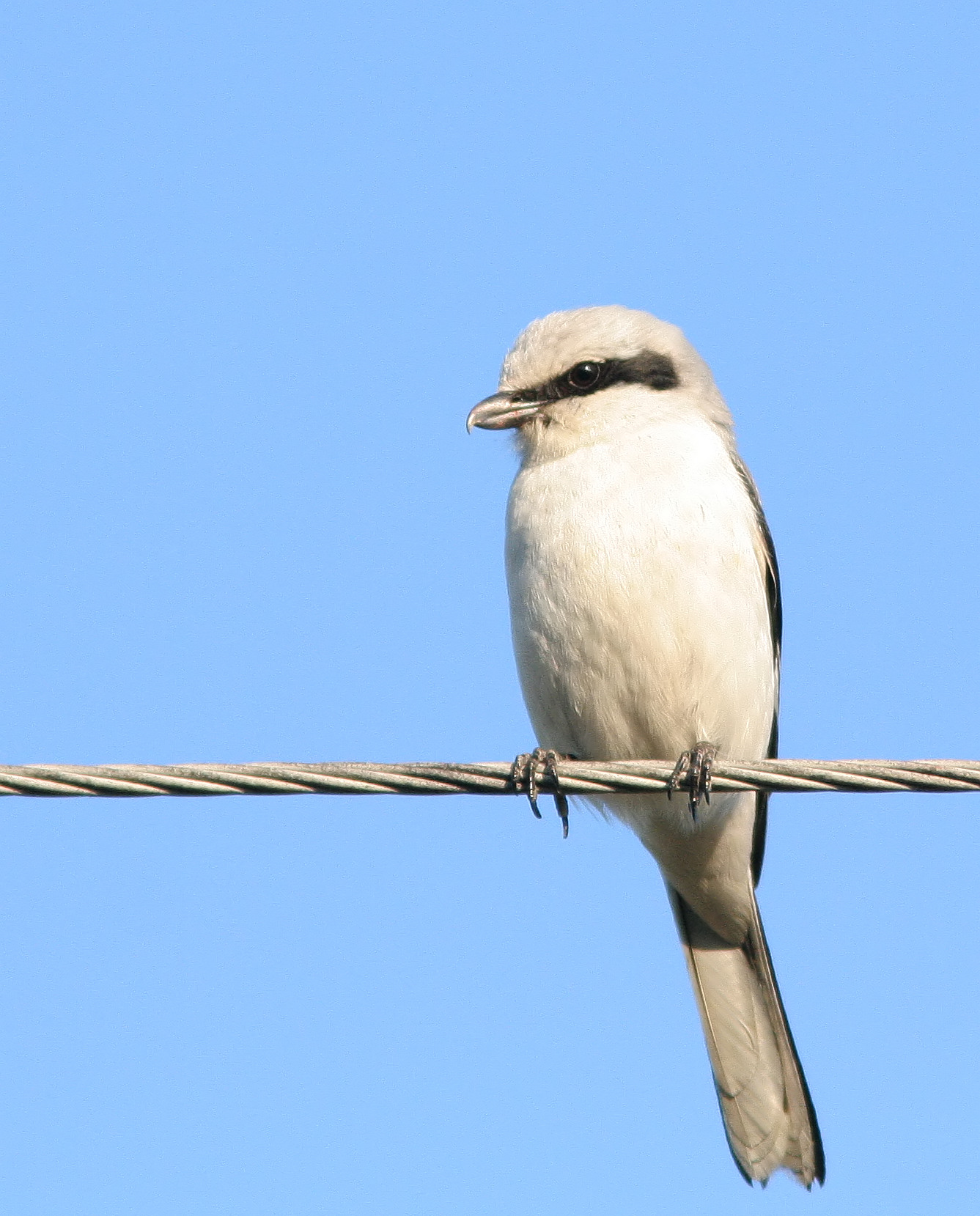 Lanius excubitor in Lasy Janowskie, Poland